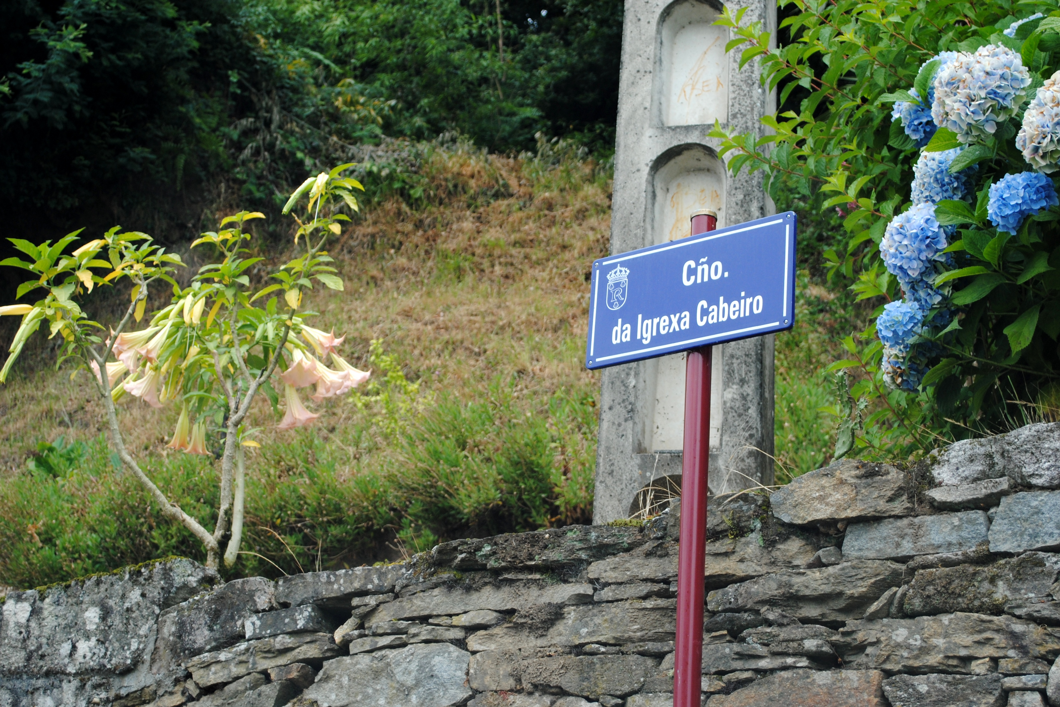 Igrexa Cabeiro, Redondela, cño.